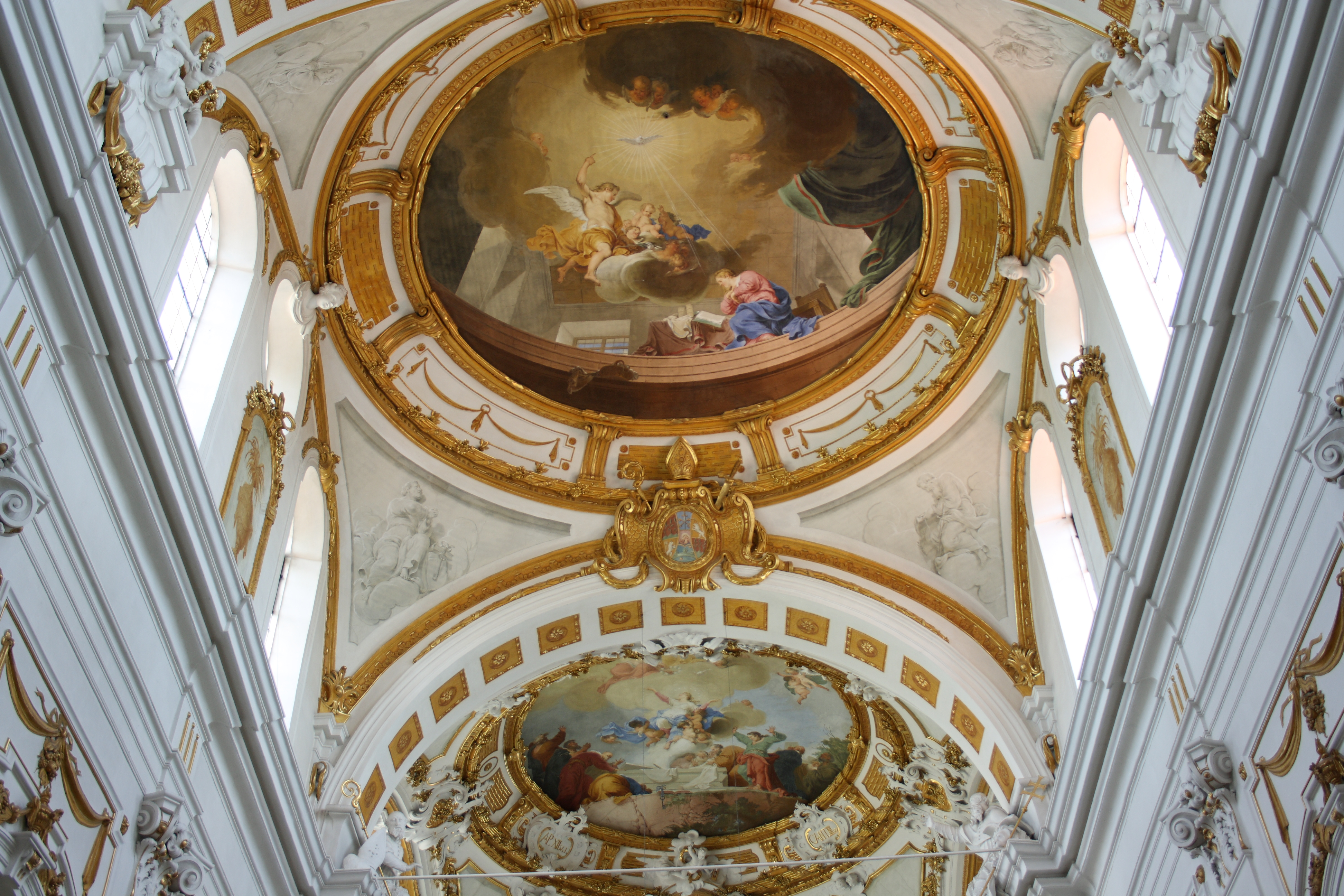 Katholische Pfarr- und Wallfahrtskirche St. Peter und Paul in Oberelchingen, einem Ortsteil von Elchingen im Landkreis Neu-Ulm (Bayern), Deckenfresko im Mittelschiff von Januarius Zick von 1782/83, Darstellung: Mariä Verkündigung (oben), Mariä Himmelfahrt (unten)